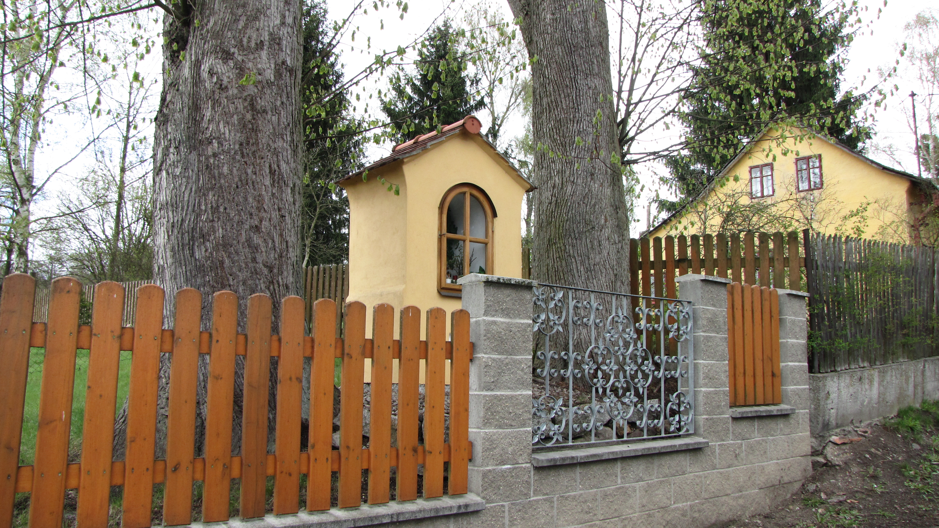 Kaplička v Úžlabí